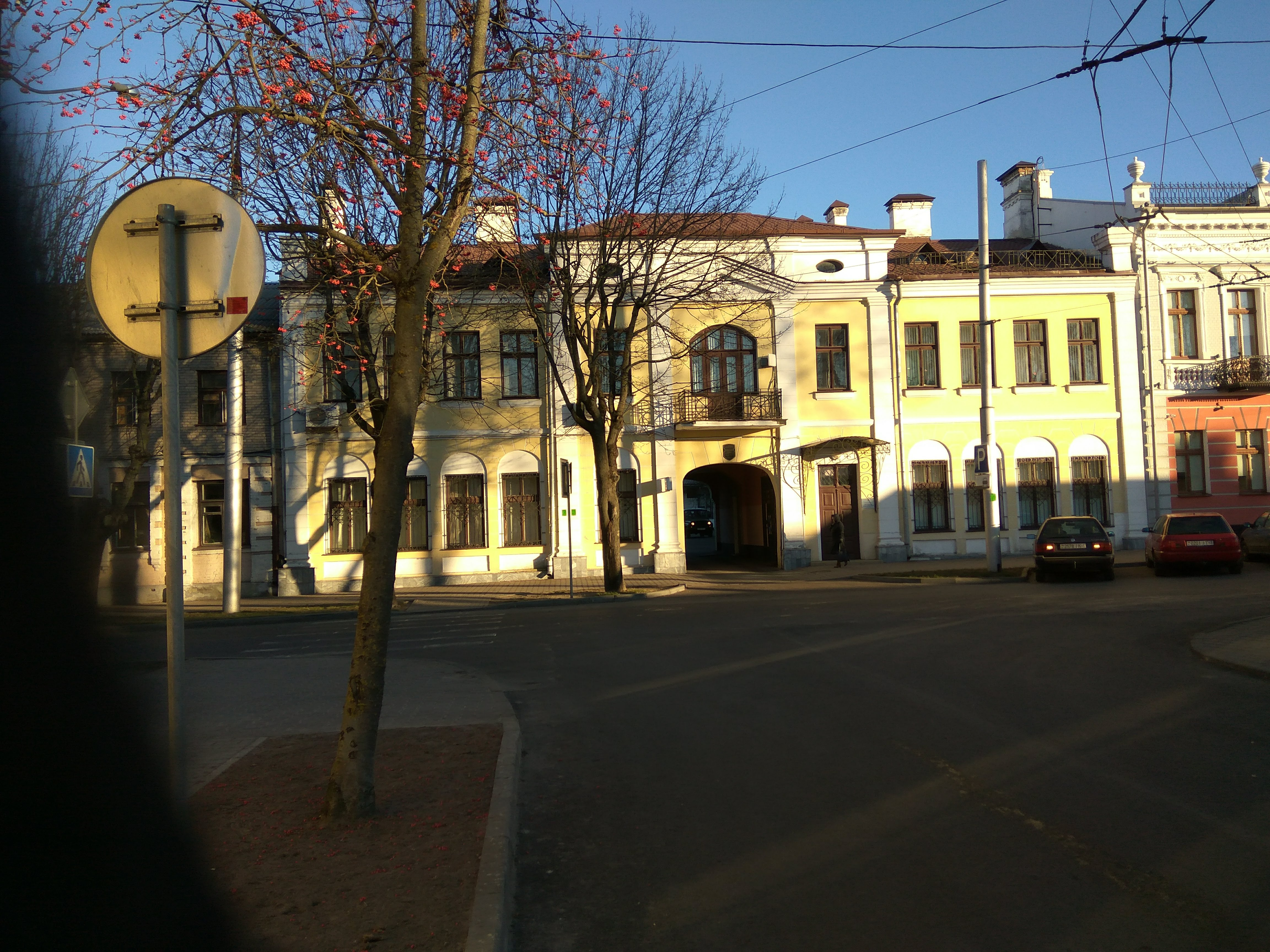 Брэст. Вуліца Савецкіх пагранічнікаў